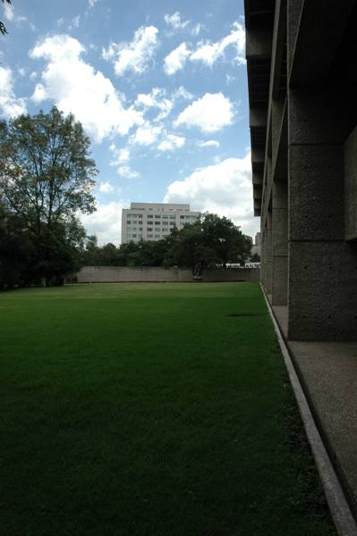 COLMEX von außen.